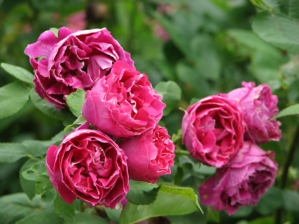 OLD.R Baron Girod de L'Ain バロン ジロー ド ラン France フランス 1897